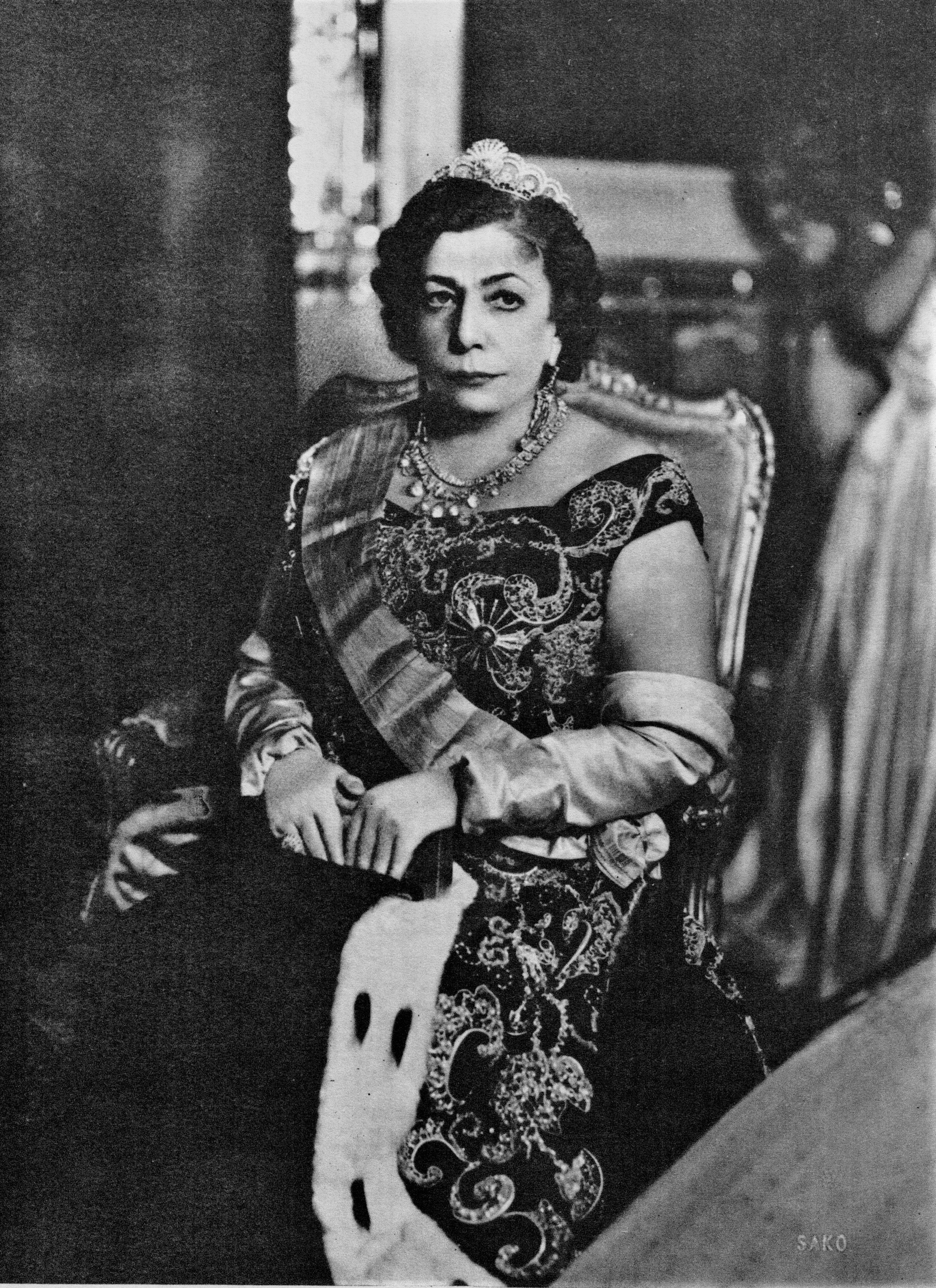 La reine d'Iran Tadj ol-Molouk, portrait présumé de 1926